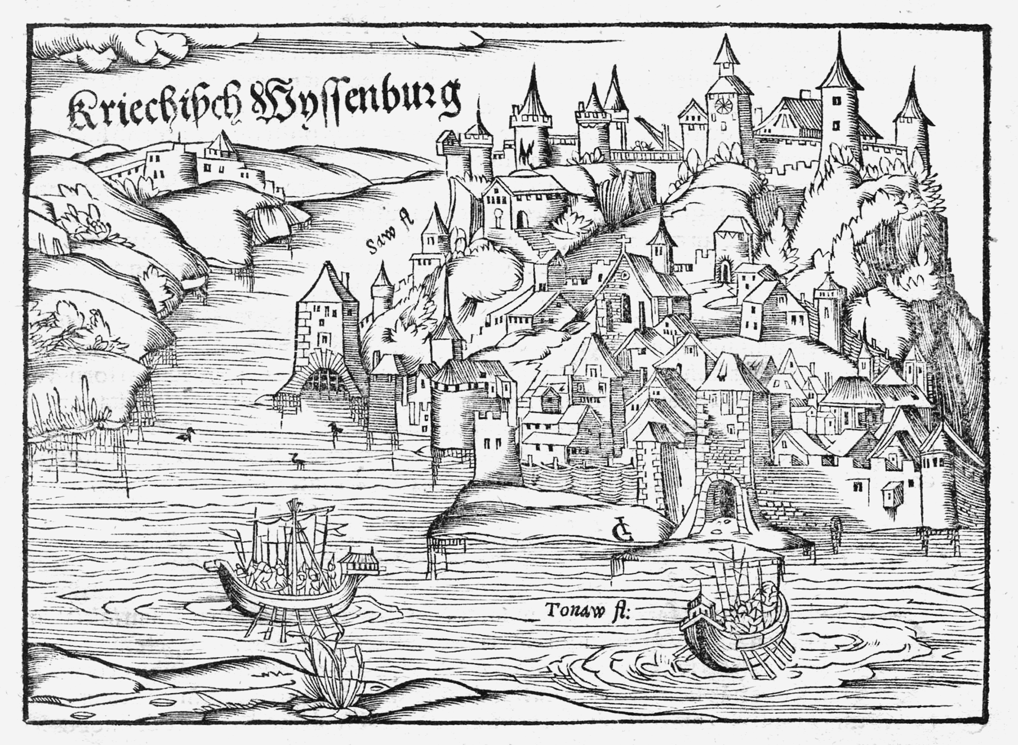 Holzschnitt zum Text Kriechisch Weyssenburg wird belagert in der Basler Cosmographia von Sebastian Münster, Türkische Belagerung von Belgrad 1456.